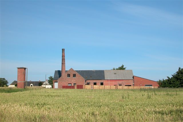 Skovby mejeri